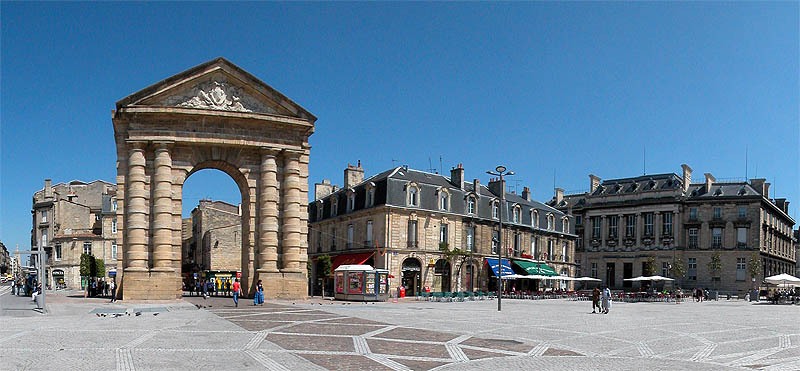 Foto: Boštjan Burger, julij 2004(Bordeaux - mestno središče)